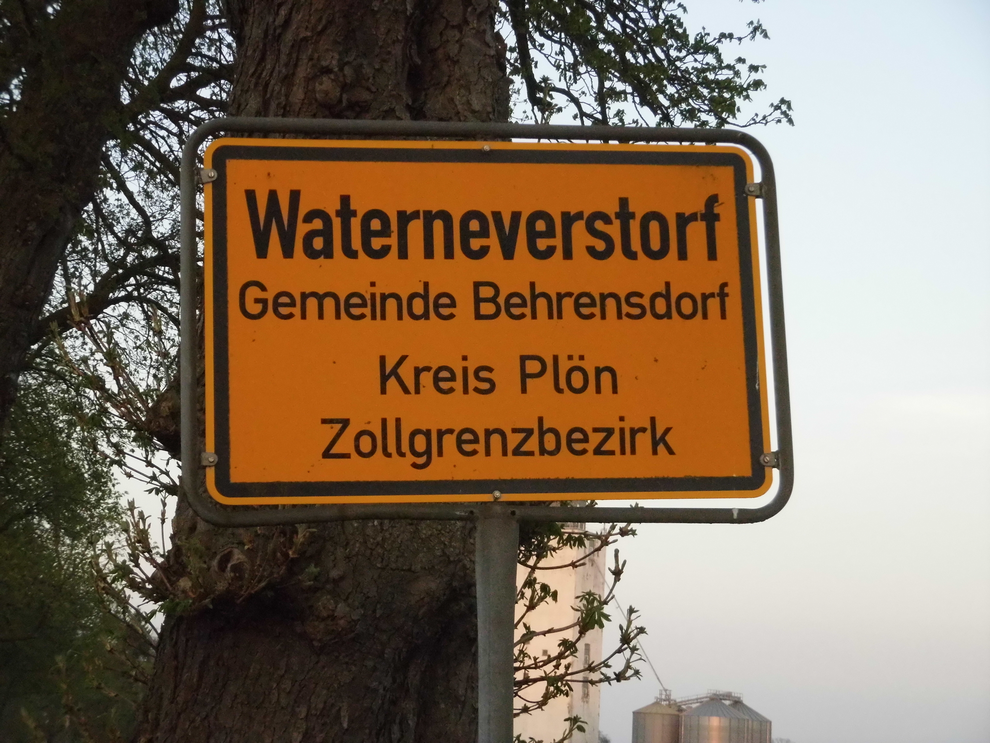 Überholtes Ortsschild von Waterneverstorf